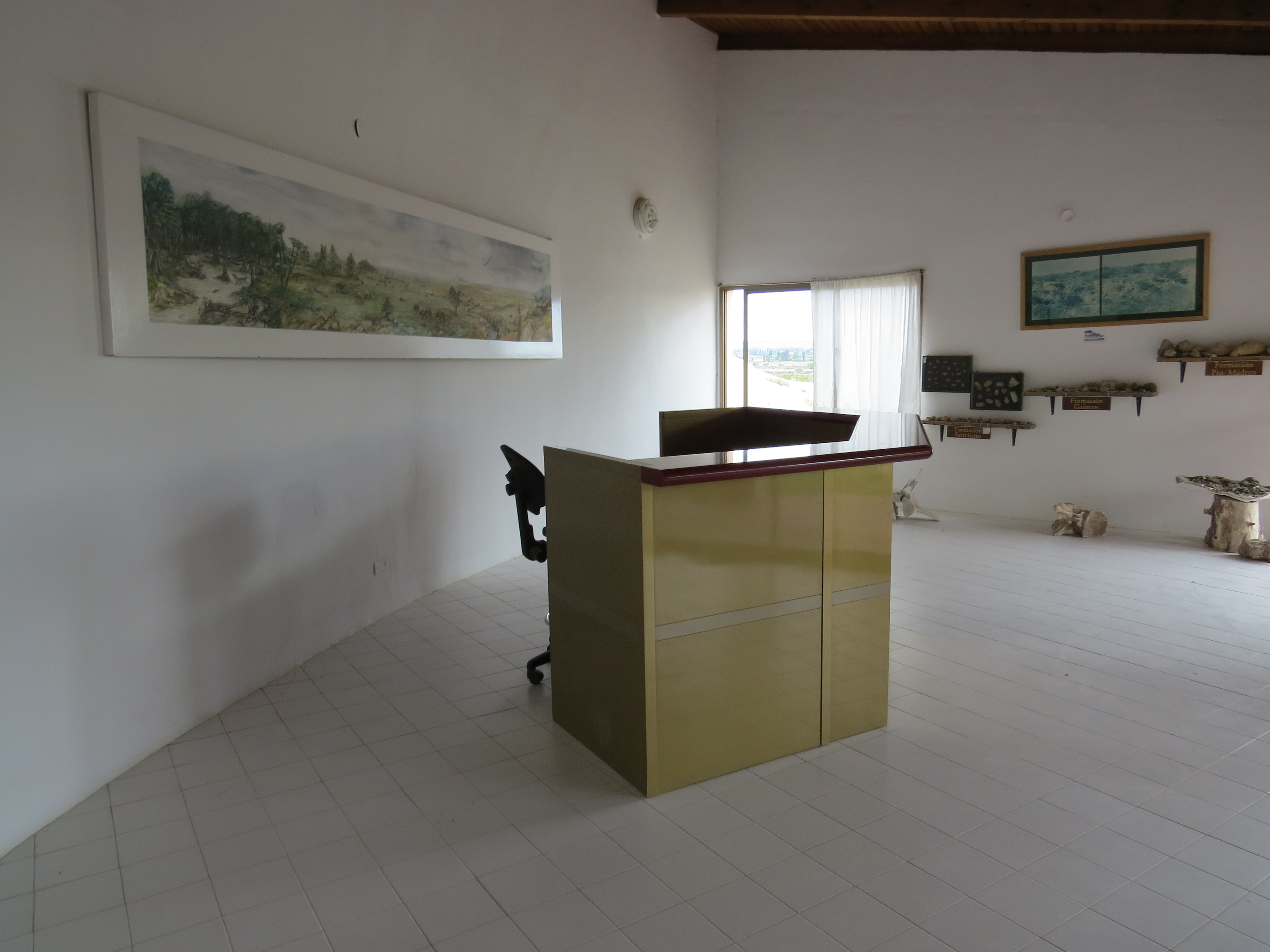 Estacion de campo Bryn Gwyn